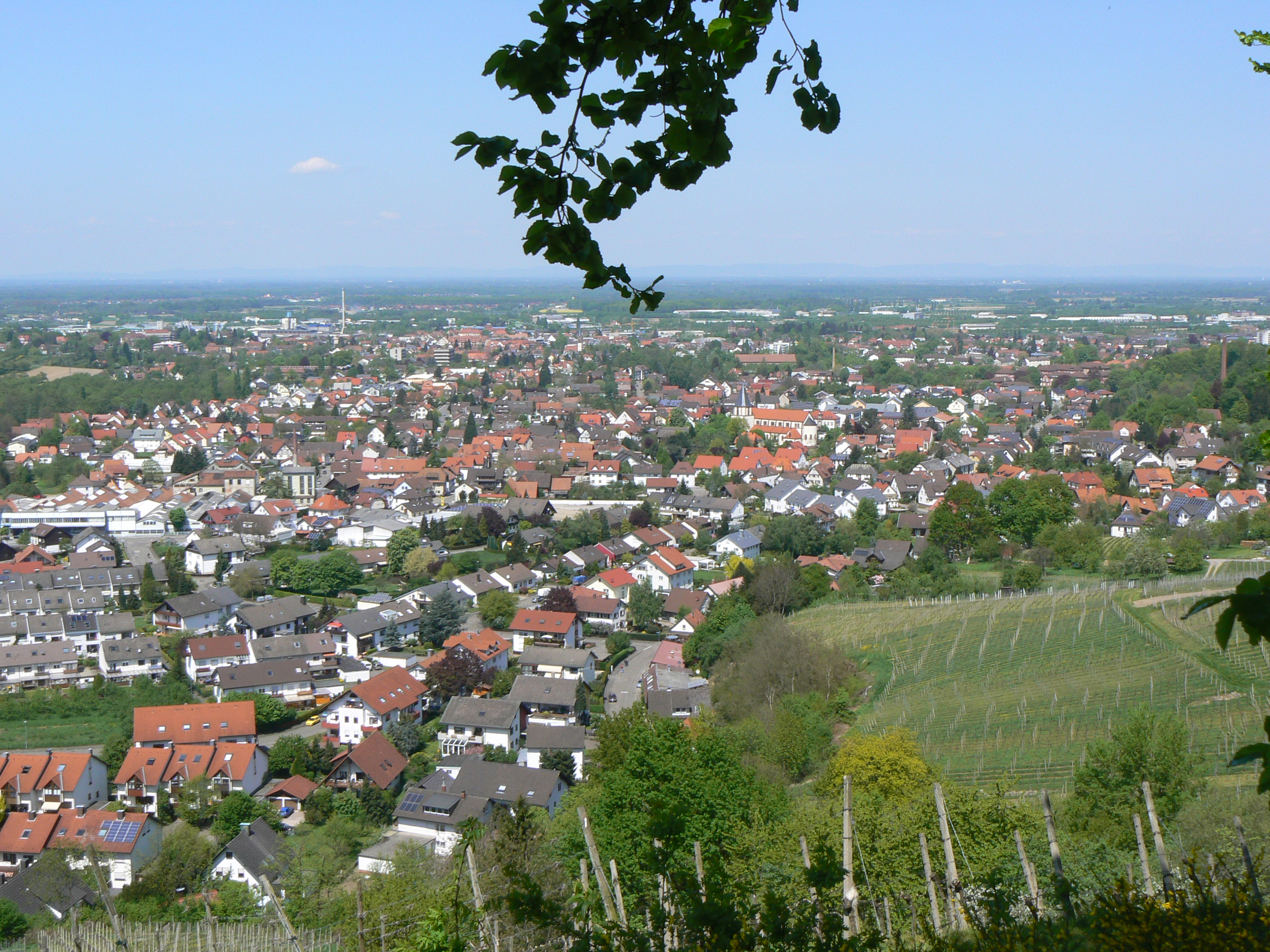 Blick vom Bienenbuckel auf Oberachern